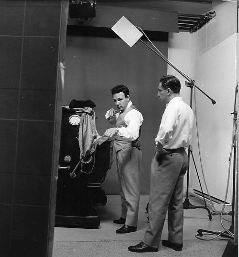 Tullio Farabola con la Hasselblad